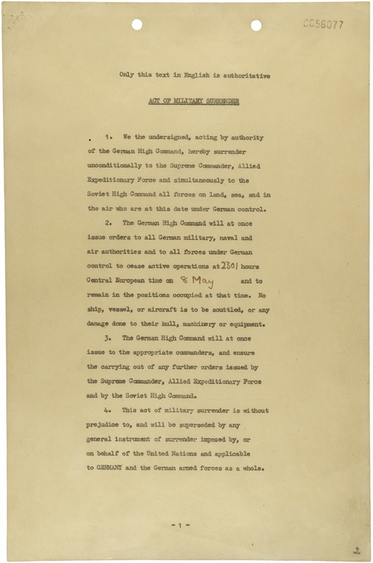 כתב הכניעה של גרמניה בריימס (1)